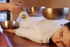 Klangmassage nach Peter Hess auf einem Massagetisch